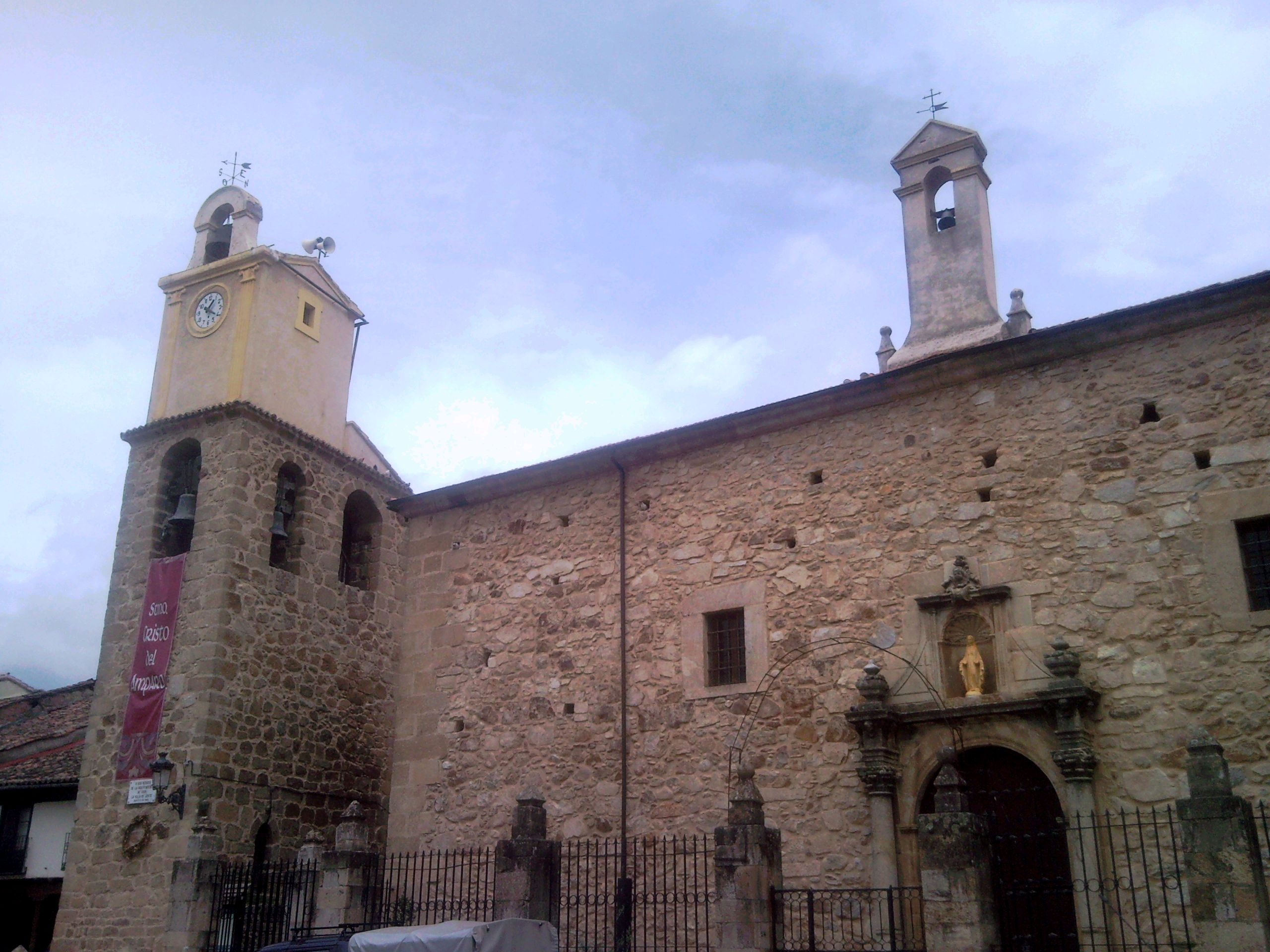 Iglesia de Nuestra Señora de la Asunción, en Jerte (Cáceres)